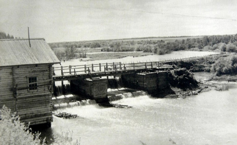 Летом 1949 года на том самом месте, где стояла купеческая мельница, вблизи деревни Полом начали строить Тураевскую ГЭС. Она просуществовала до создания единой энергетической сети в 1970-х годах.